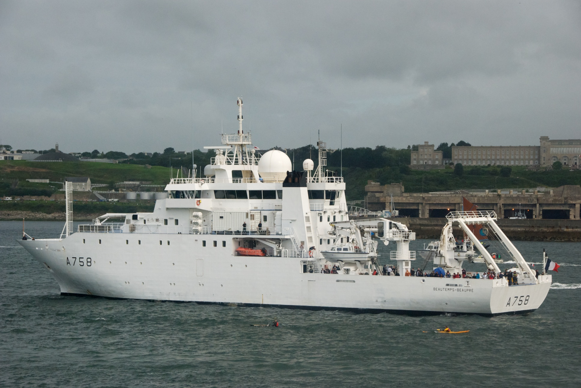 Tonnerres de Brest 2012 Beautemps-Beaupré